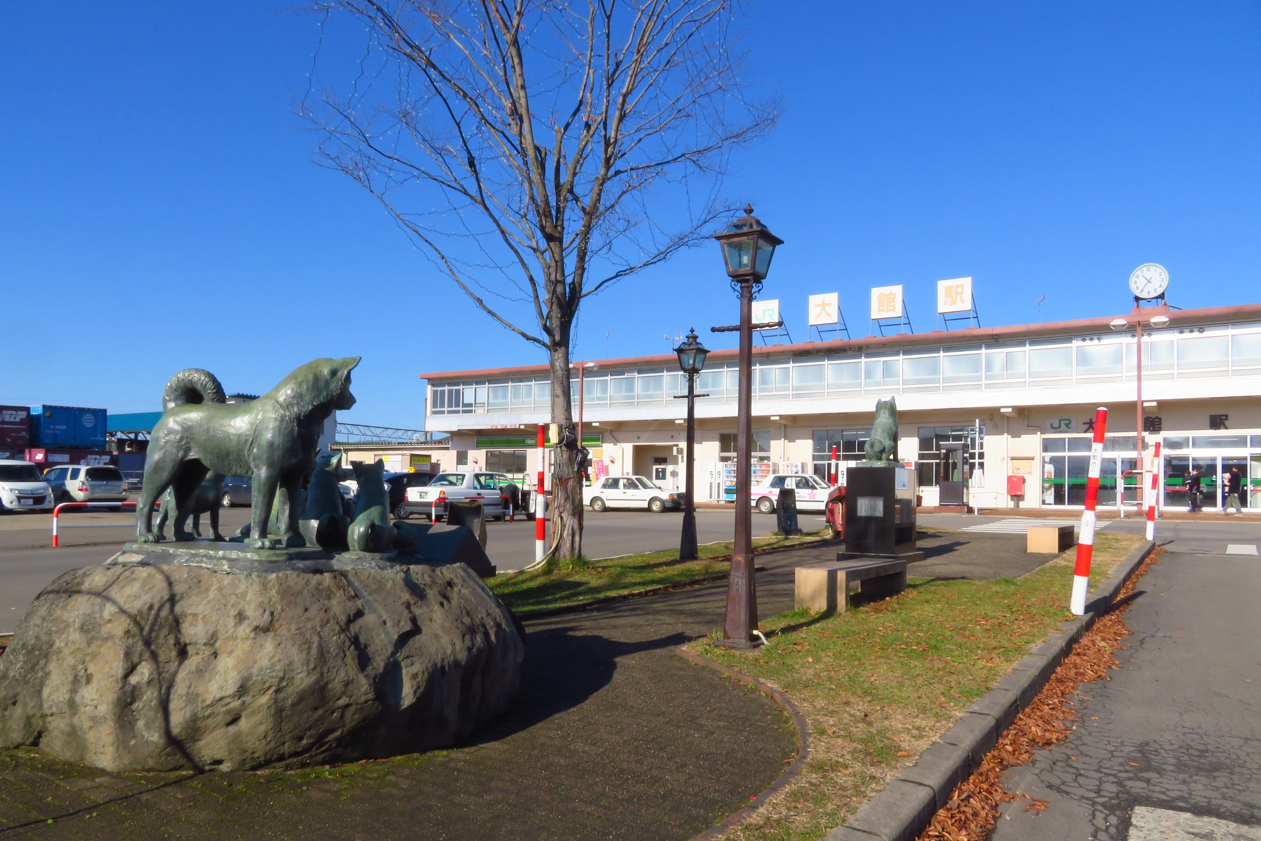 大館駅（JR奥羽本線・花輪線） Canon PowerShot SX720 HS